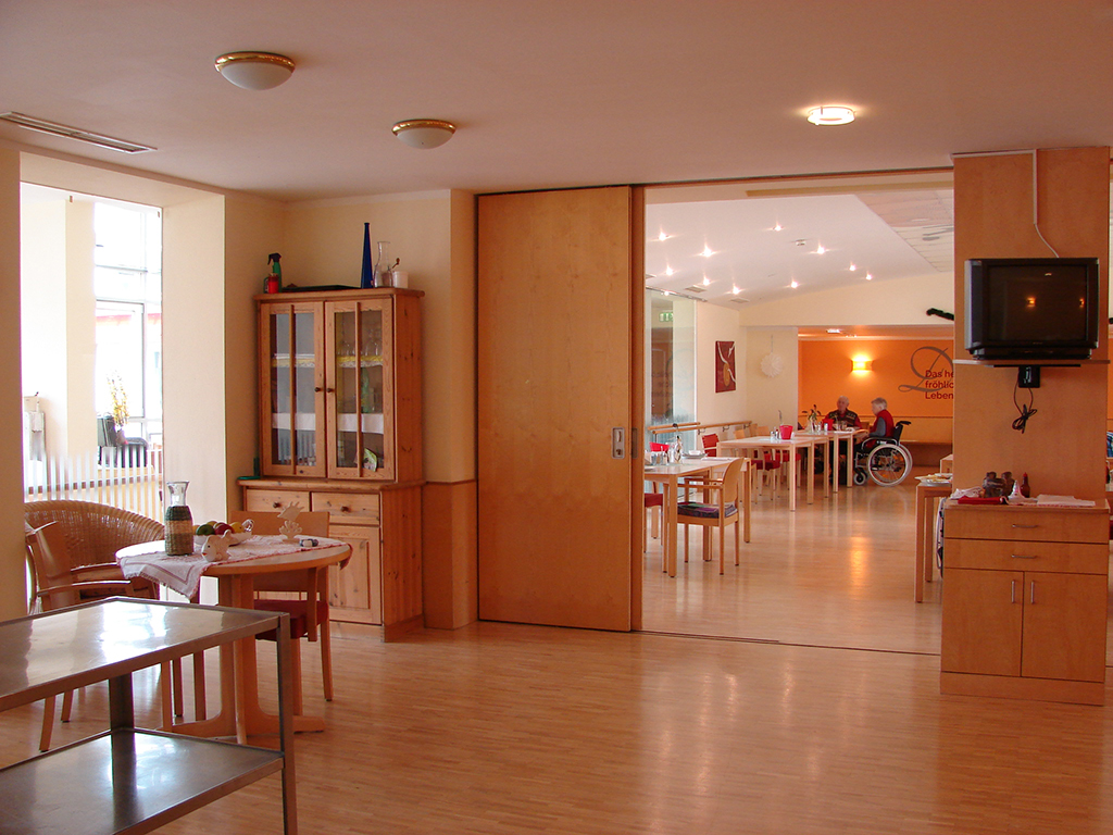 Speisesaal des Altenwohn- und Pflegeheim Peinten